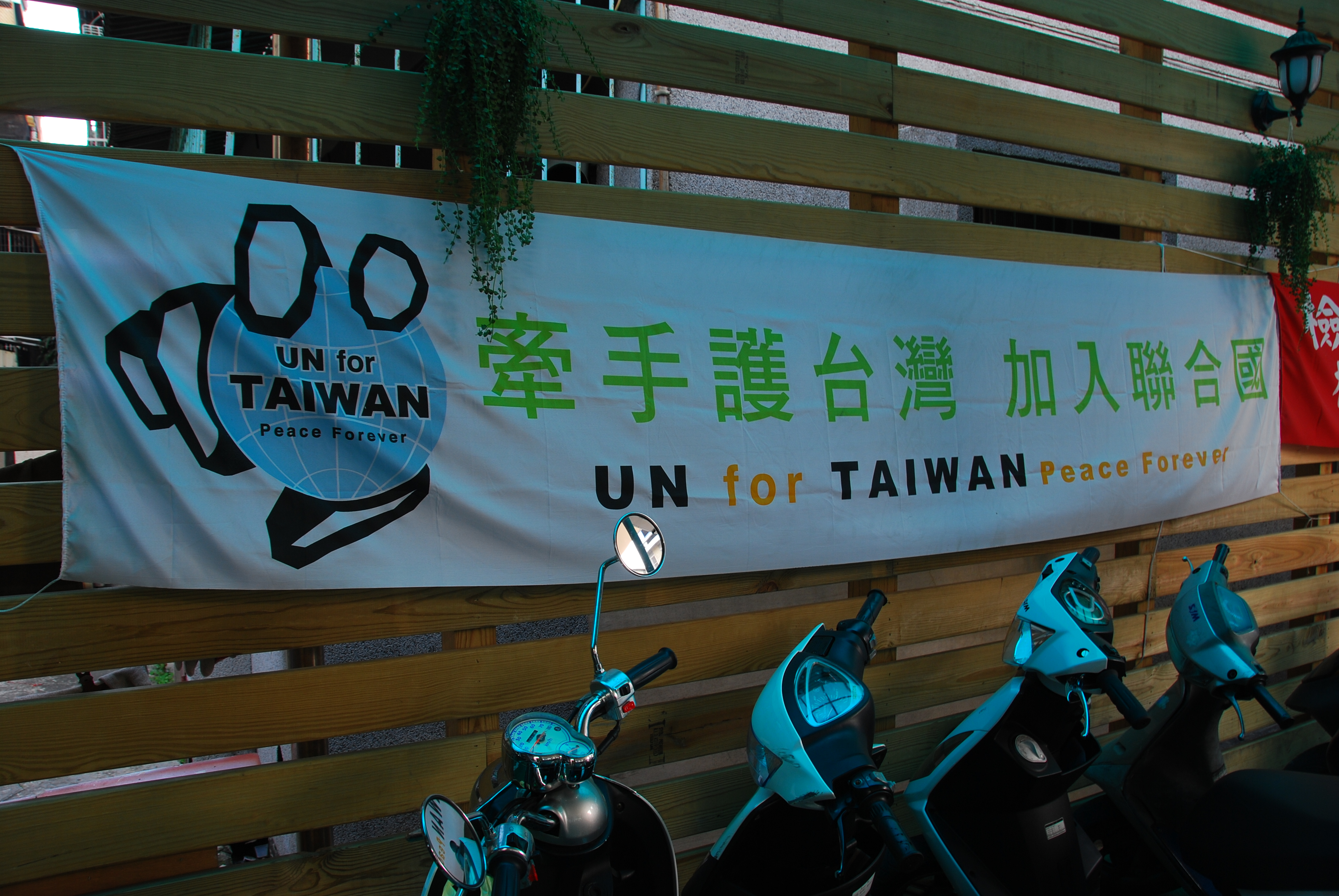 中文（台灣）: 2008年臺灣入聯公民投票宣傳布條。